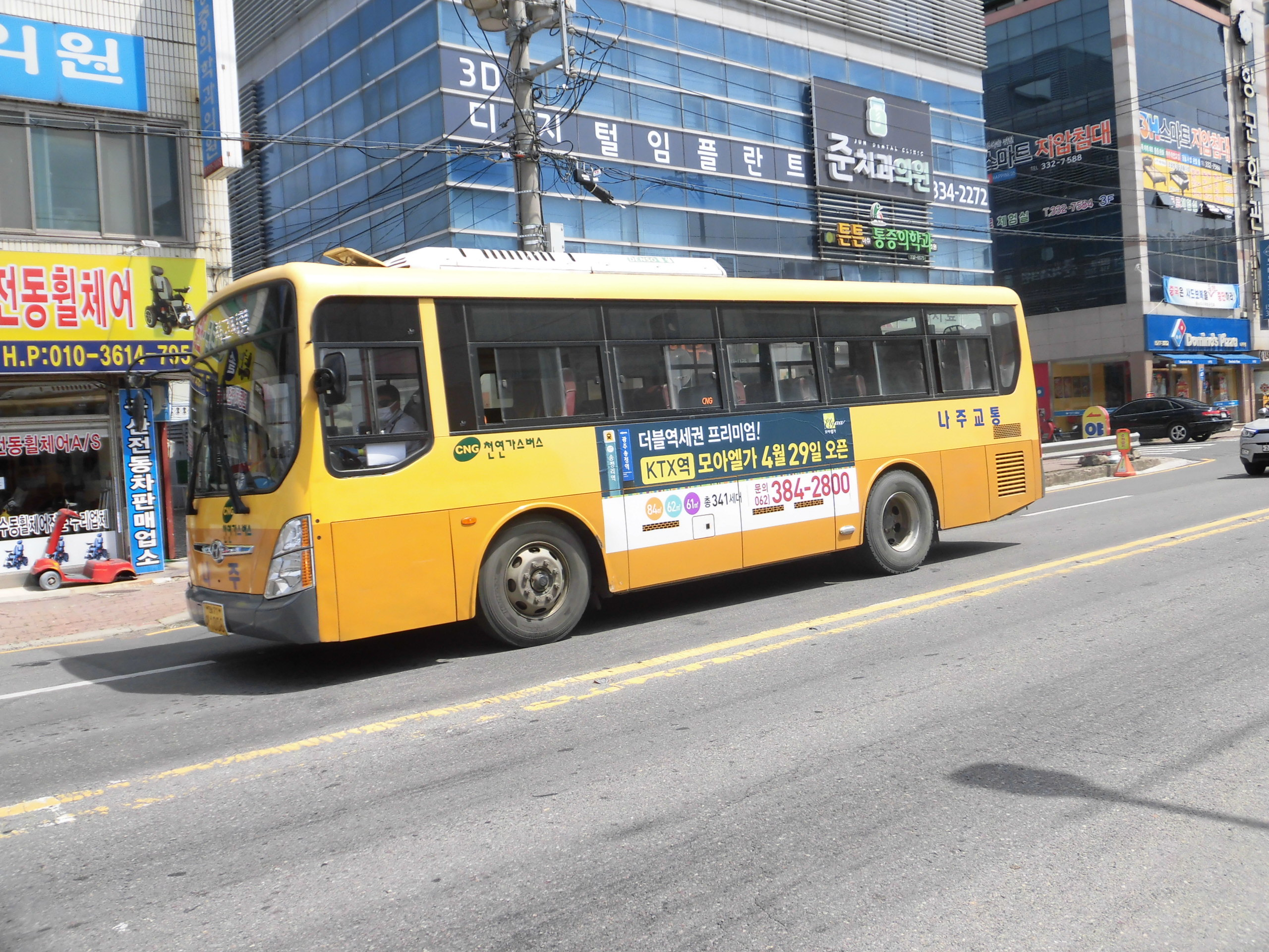 나주교통